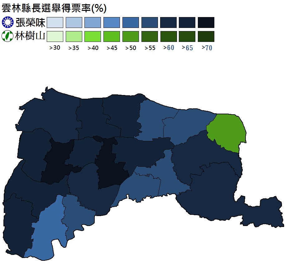 2001年雲林縣長選舉